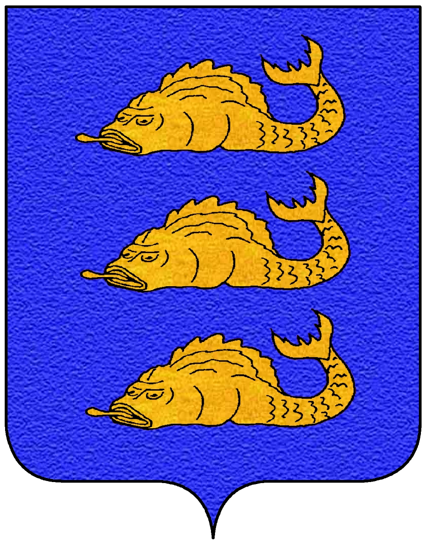 Stemma della famiglia dei Dolfin, appartenente al patriziato di Venezia.